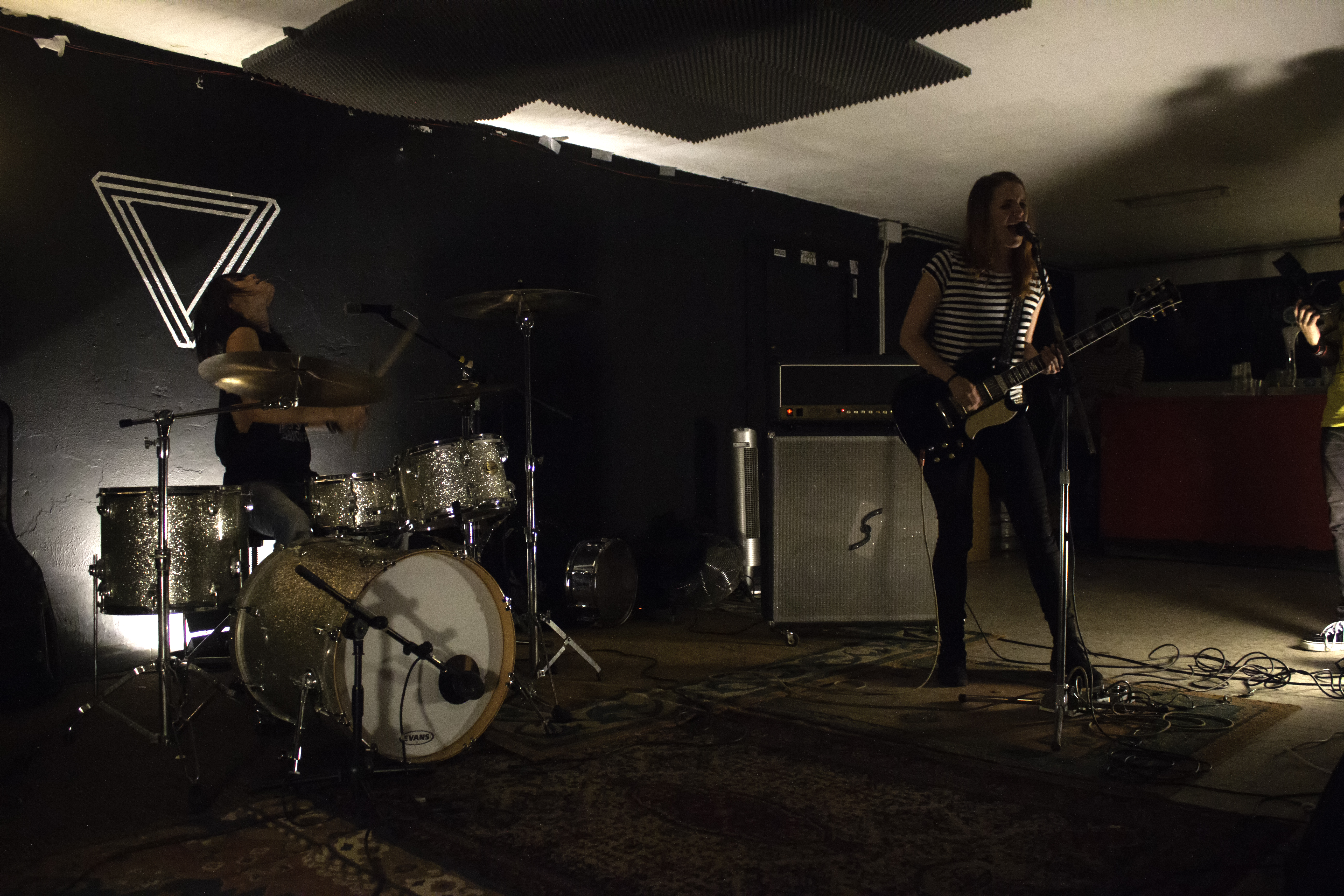 A banda galega Bala no Liceo Mutante de Pontevedra en 2014.